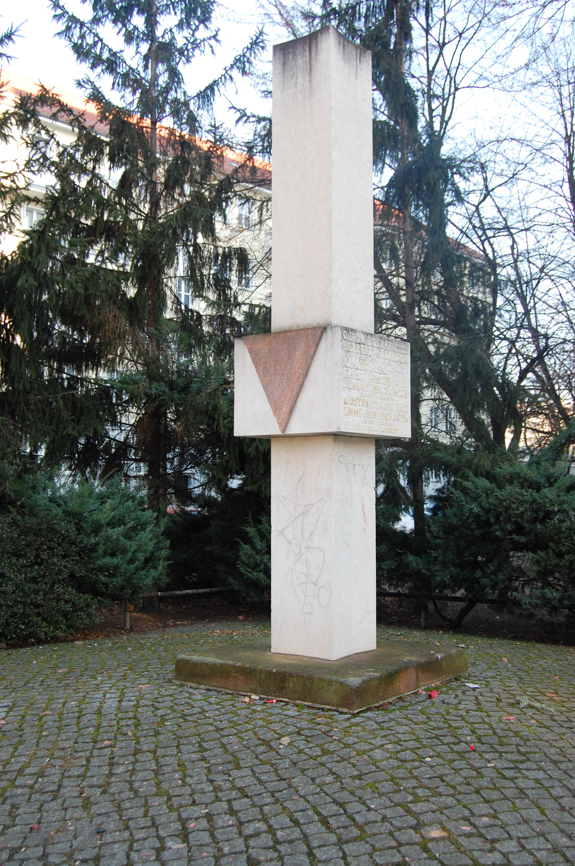 Gedenkstelle für antifaschistische Widerstandskämpfer in Berlin-Friedrichshain, Singerstraße Ecke Koppenstraße.